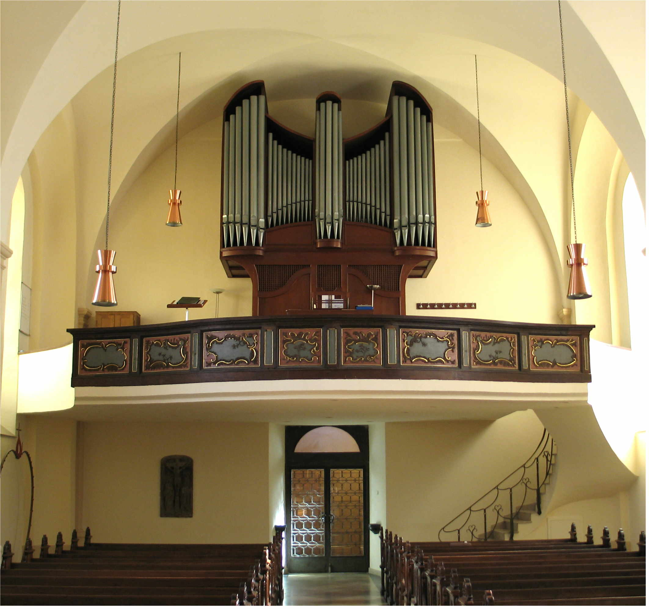 Sujet: D'Uergel an der Kierch vu Rëmerschen.